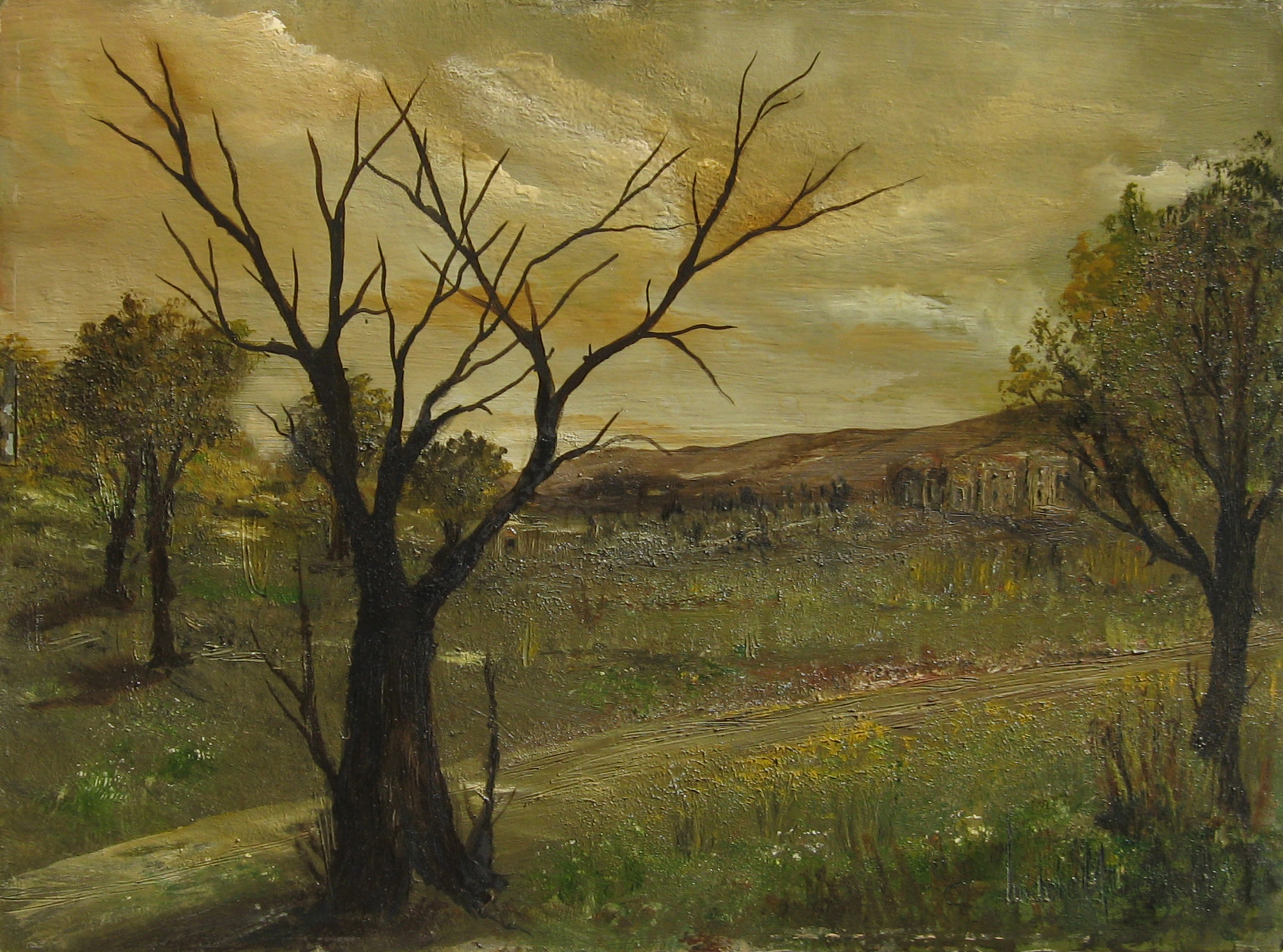 Autunnale